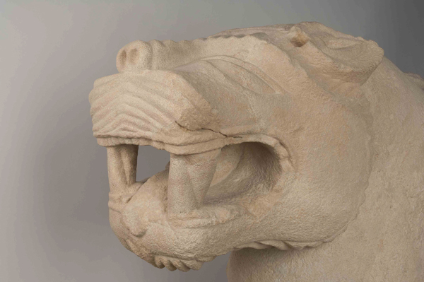 Monumento de Pozo Moro (Sillar, detalle) (Cultura ibérica). Número de inventario: 1999-76-A-13.